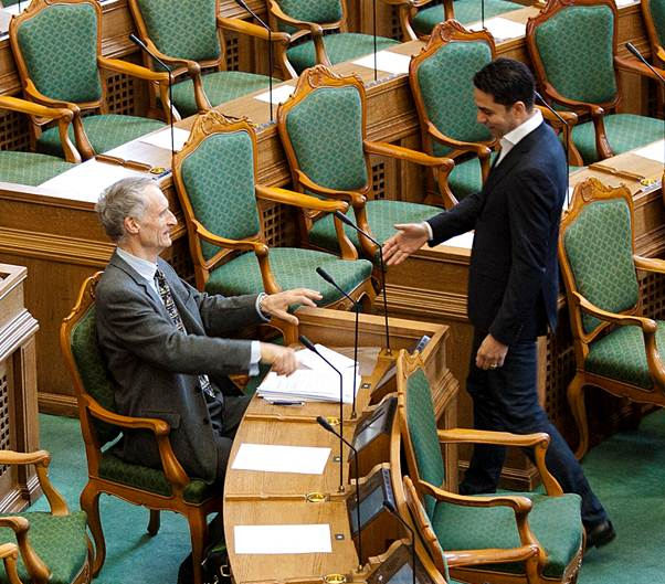 Bertel Haarder og Manu Sareen efter grænsehindringsdebat i det danske Folketing.